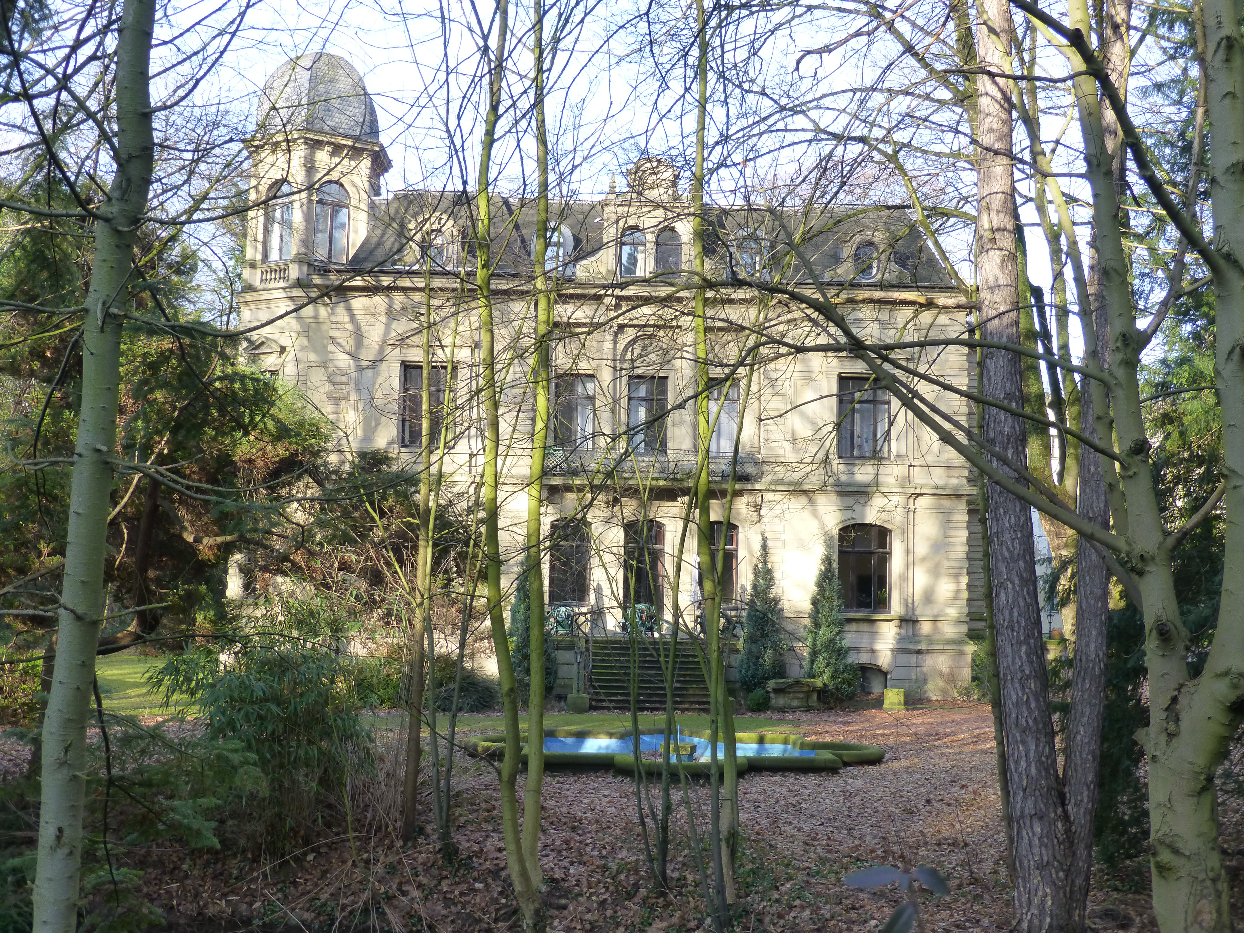 Briller Straße, Wuppertal